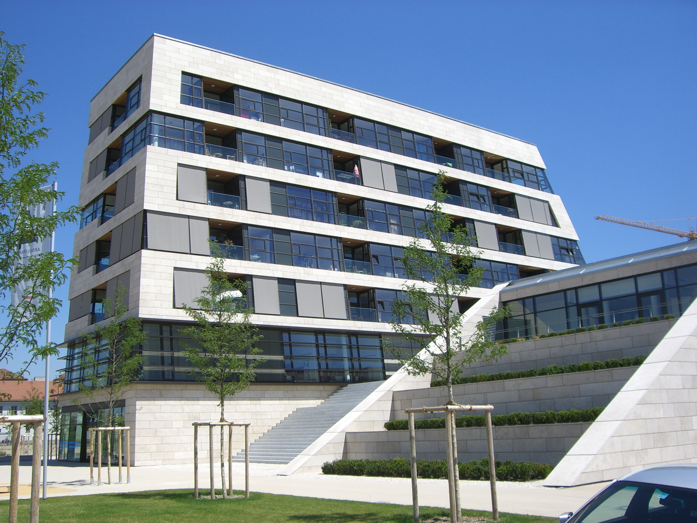 München - Arnulfpark (Gebäude)